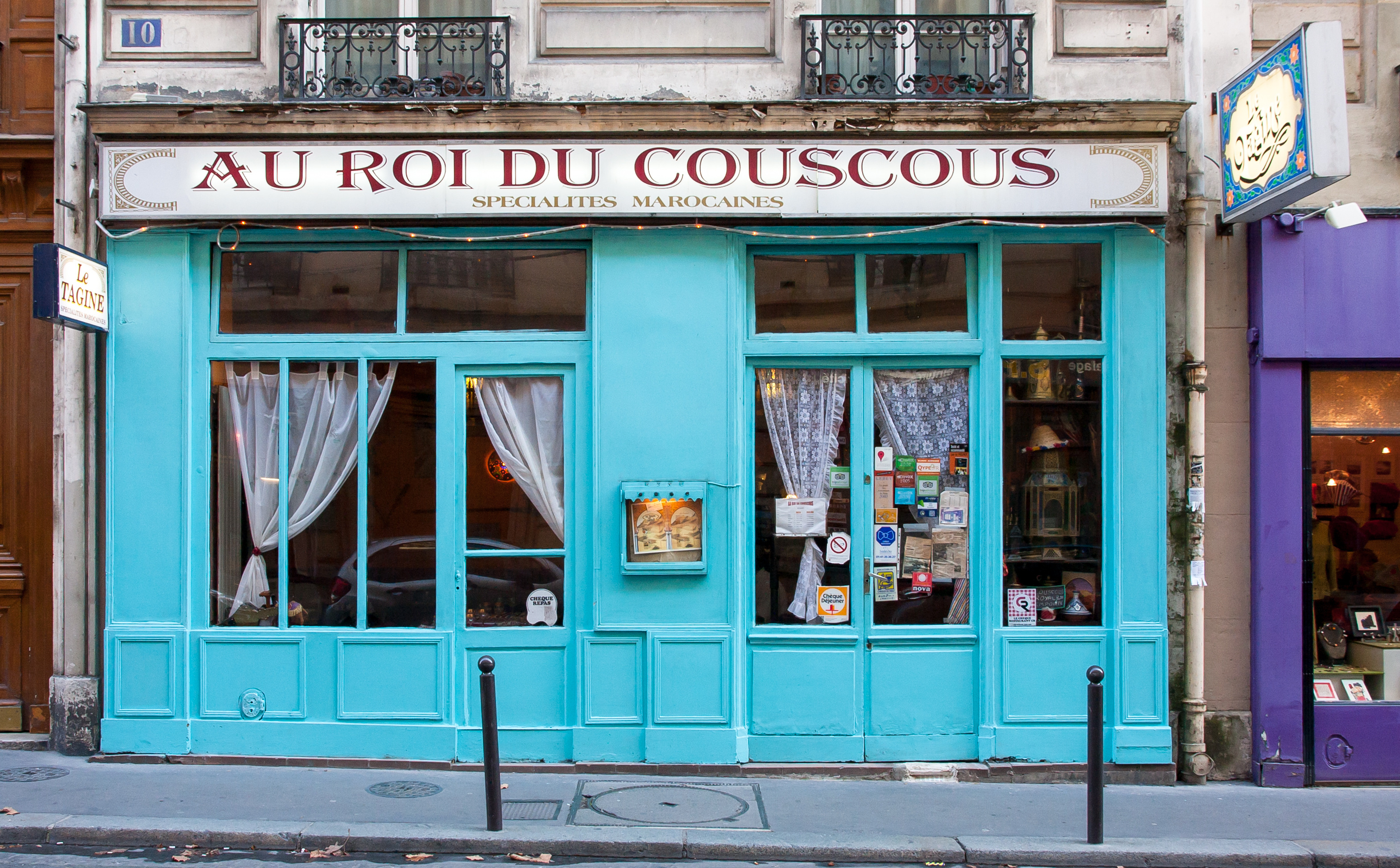 Le roi du couscous, 10 Rue Sophie Germain, 14e arrondissement, Paris, France.